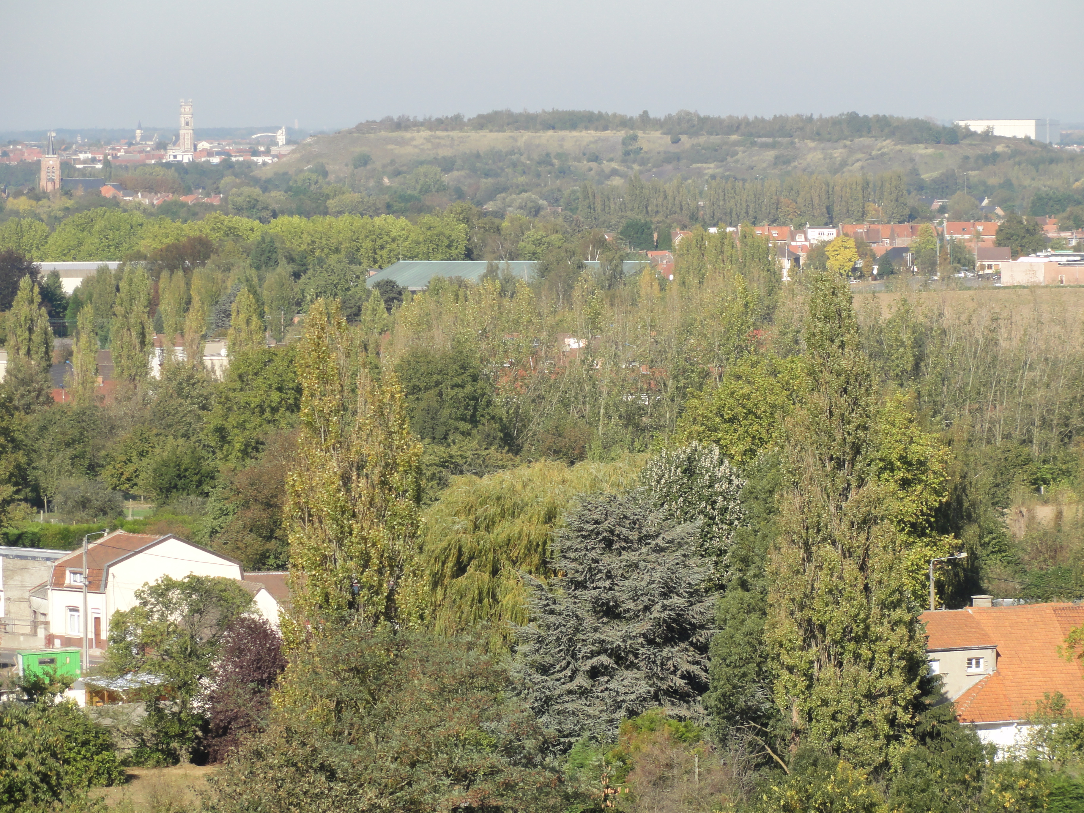 Terrils nos 83, 100 et 230 dits 7 - 19 Marais, Décharge Marais de Fouquières et Remblais Marais de Fouquières, Fosse n° 7 - 19 de la Compagnie des mines de Courrières, Fouquières-lez-Lens, Pas-de-Calais, Nord-Pas-de-Calais, France.